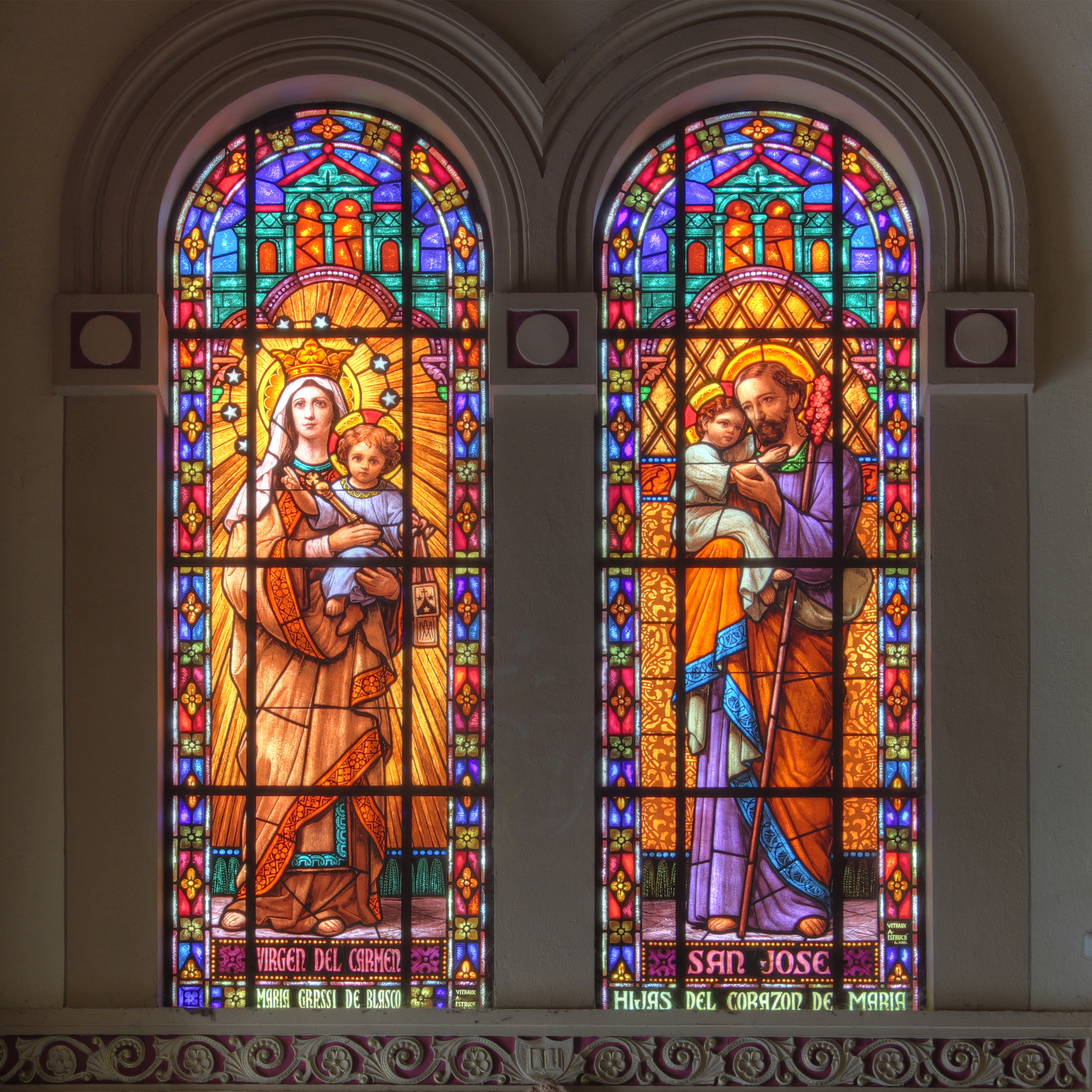 Vitral de la Parroquia Inmaculado Corazón de María, Bahía Blanca, Bs As, Argentina (Imagen de la Virgen del Carmen y San José)